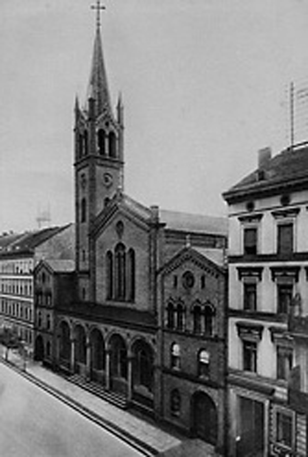 Straßenfront der St.-Lukas-Kirche nach einer Abbildung von vermutlich 1896